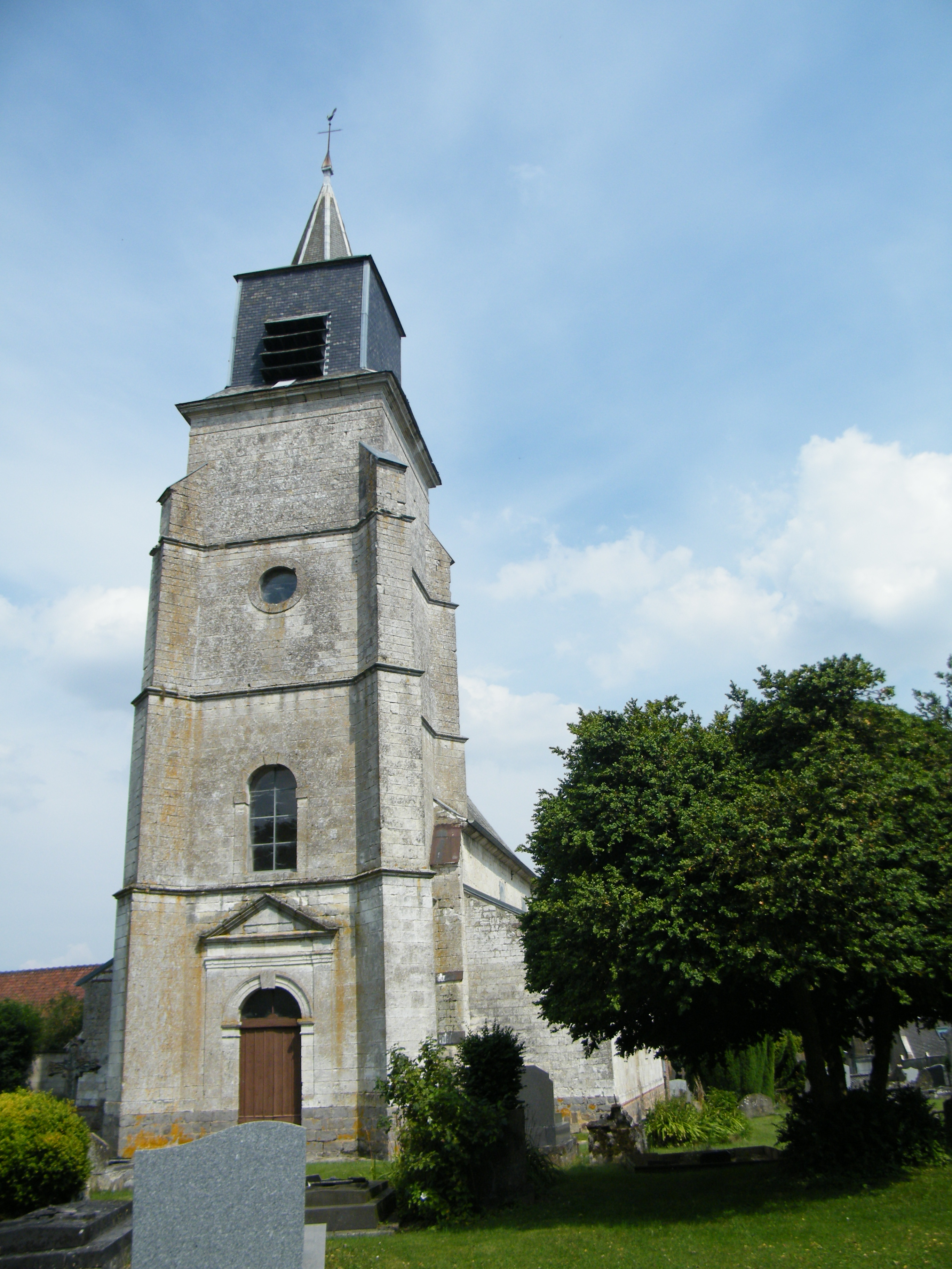 Vue du clocher.